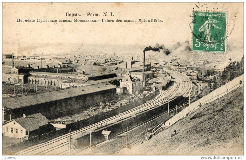 Пермские пушечные заводы Мотовилиха